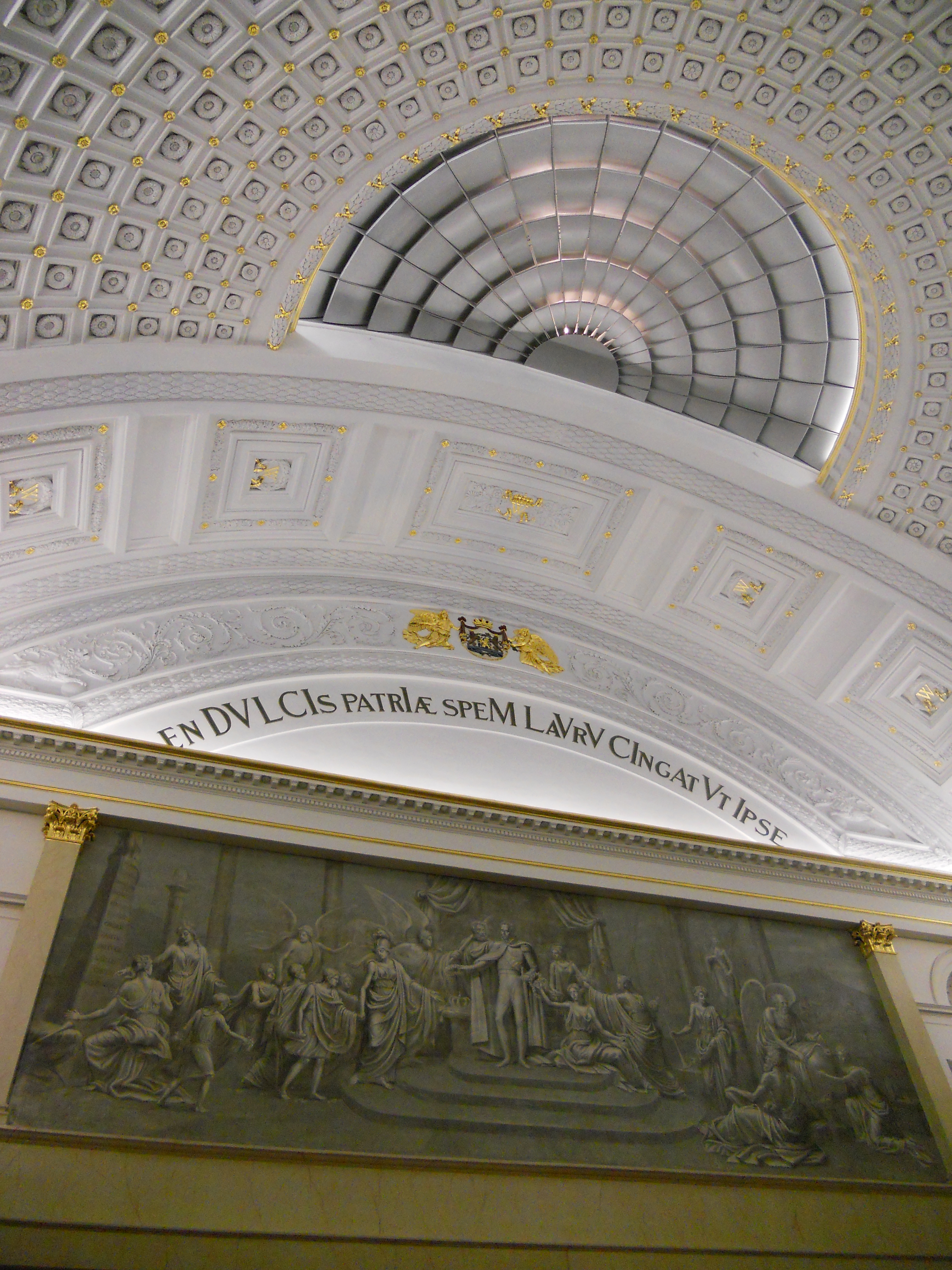 Salle Académique de l'Université. Classée depuis le 7 février 2013